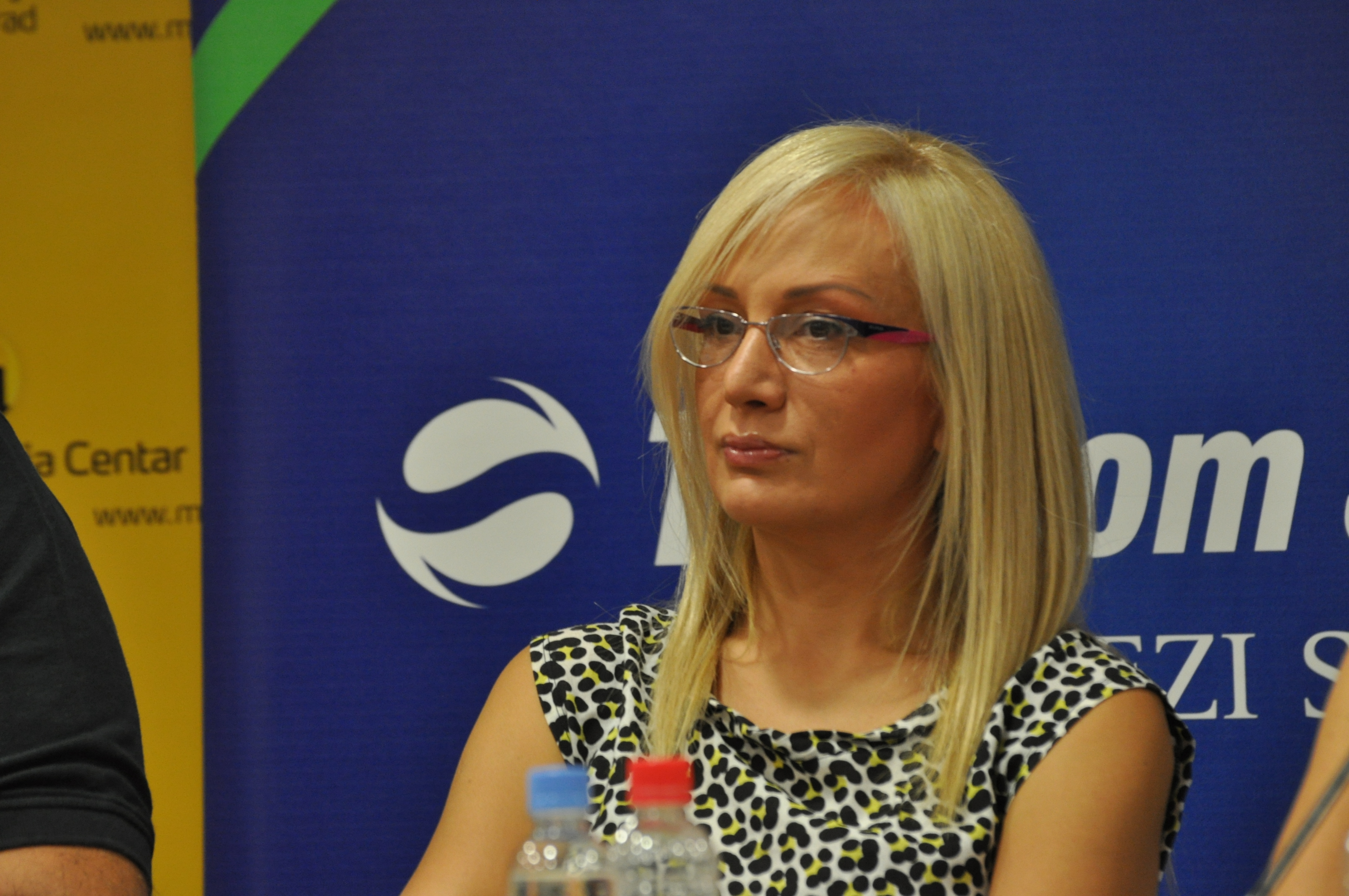 Леонтина Вукомановић